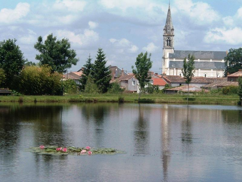 Français